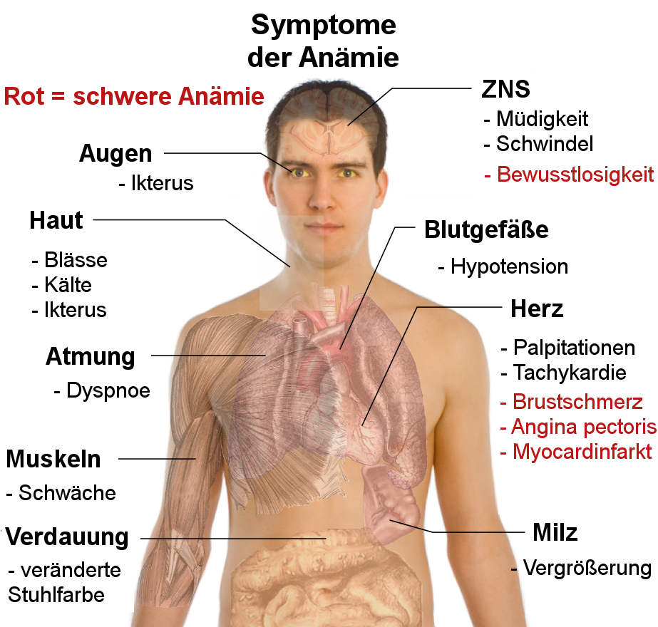 Mögliche Symptome einer Anämie. (Siehe auch Anämie#Symptome). Model: Mikael Häggström.